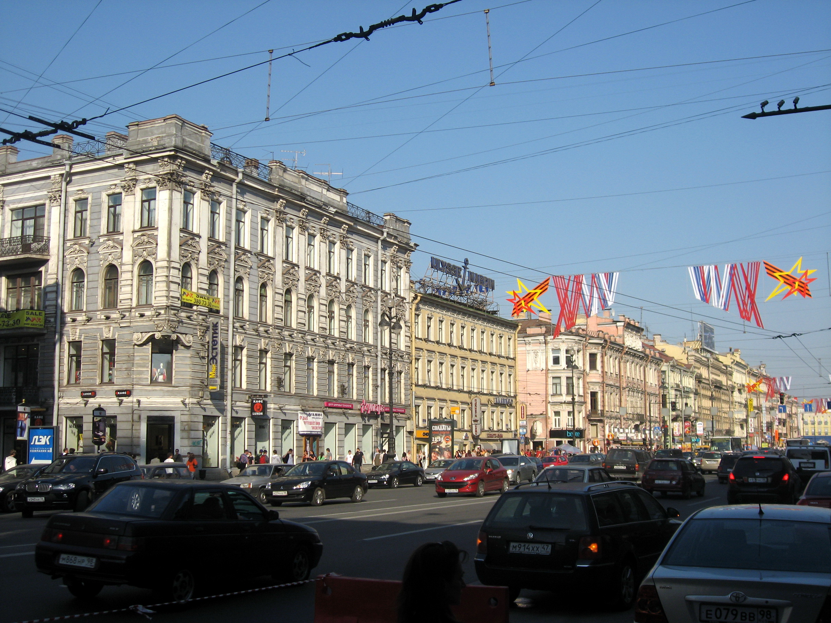 Sankt-Petěrburg (Petrohrad), Něvský prospekt